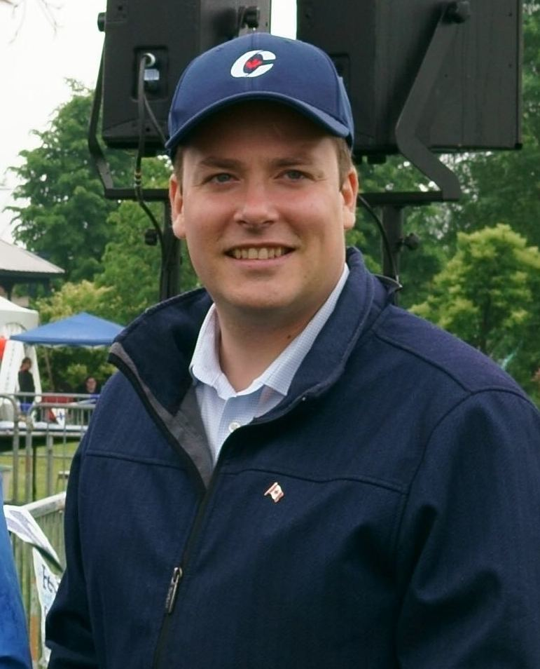 Joyeuse Fête nationale du Québec de Saint-Augustin-de-Desmaures avec Joël Godin, Gérard Deltell, Pierre Paul-Hus and Alupa Clarke! Happy Fête nationale du Québec from Saint-Augustin-de-Desmaures with Joël Godin, Gérard Deltell, Pierre Paul-Hus et Alupa Clarke!